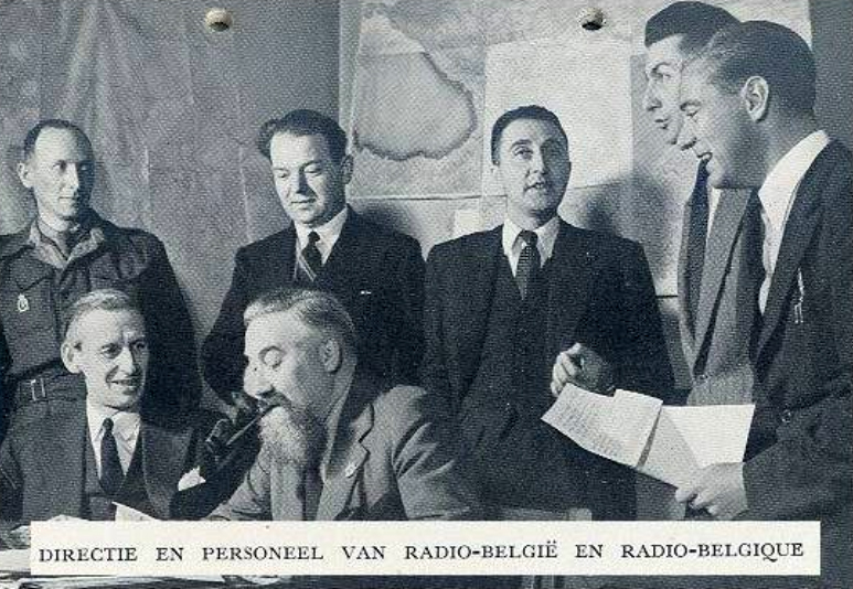 staff de Radio Belgique Belgique - Radio Belgïe à Londres, en septembre 1944 (issu d'une plaquette de la BBC)